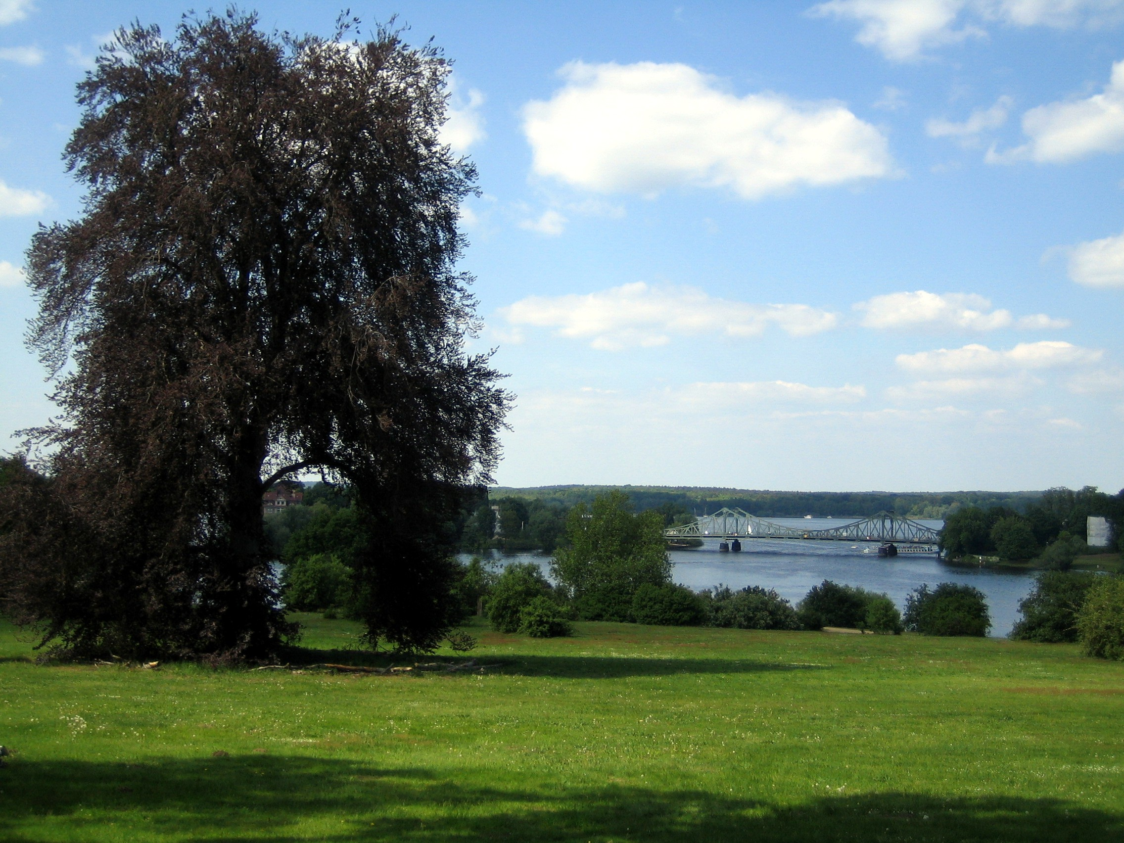 Blick vom Schlosspark Potsdam-Babelsberg zur Glienicker Brücke.